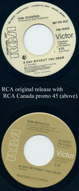 RCA US release & Canada promo 45